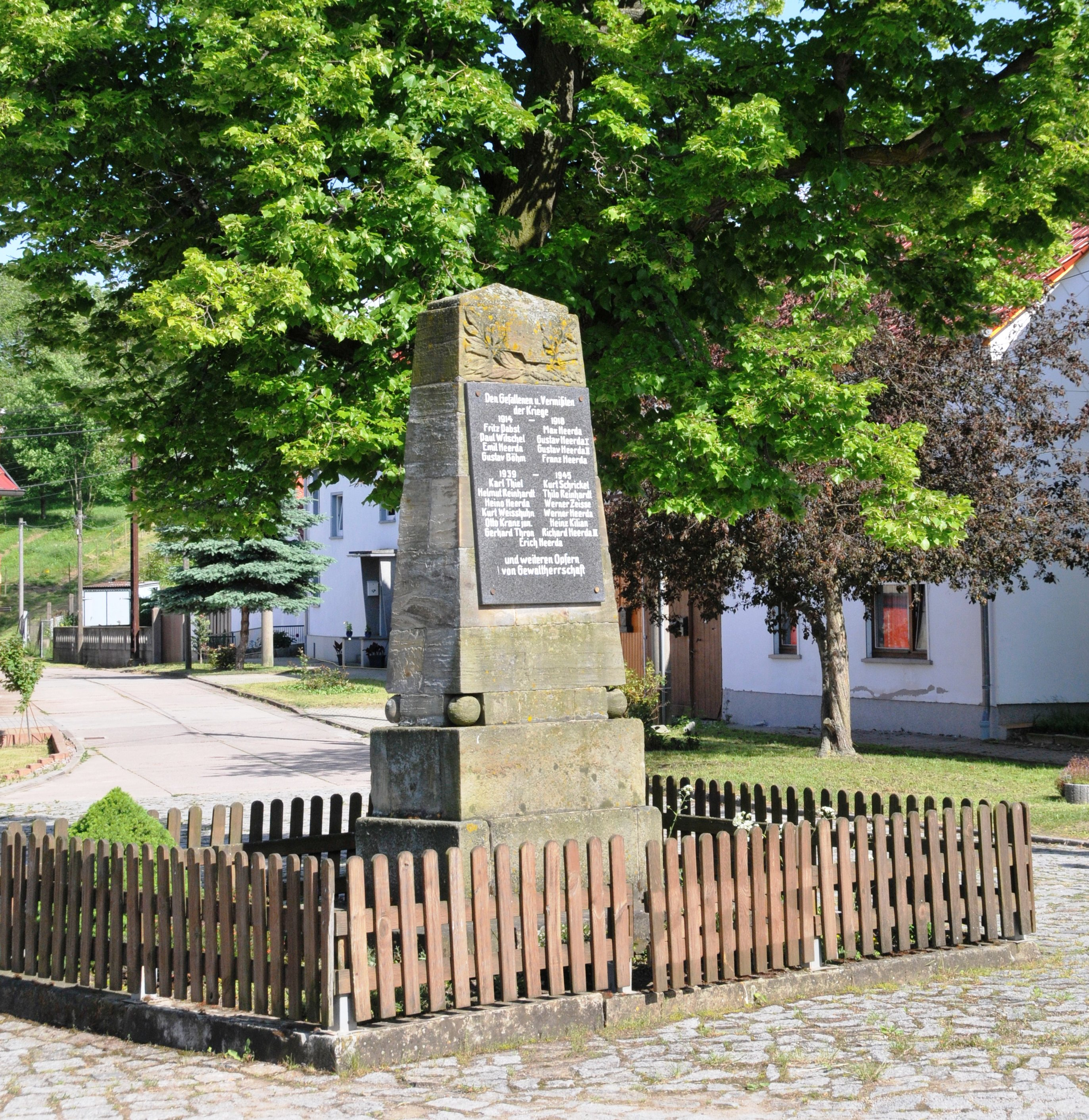 Kriegerdenkmal in Röhrensee